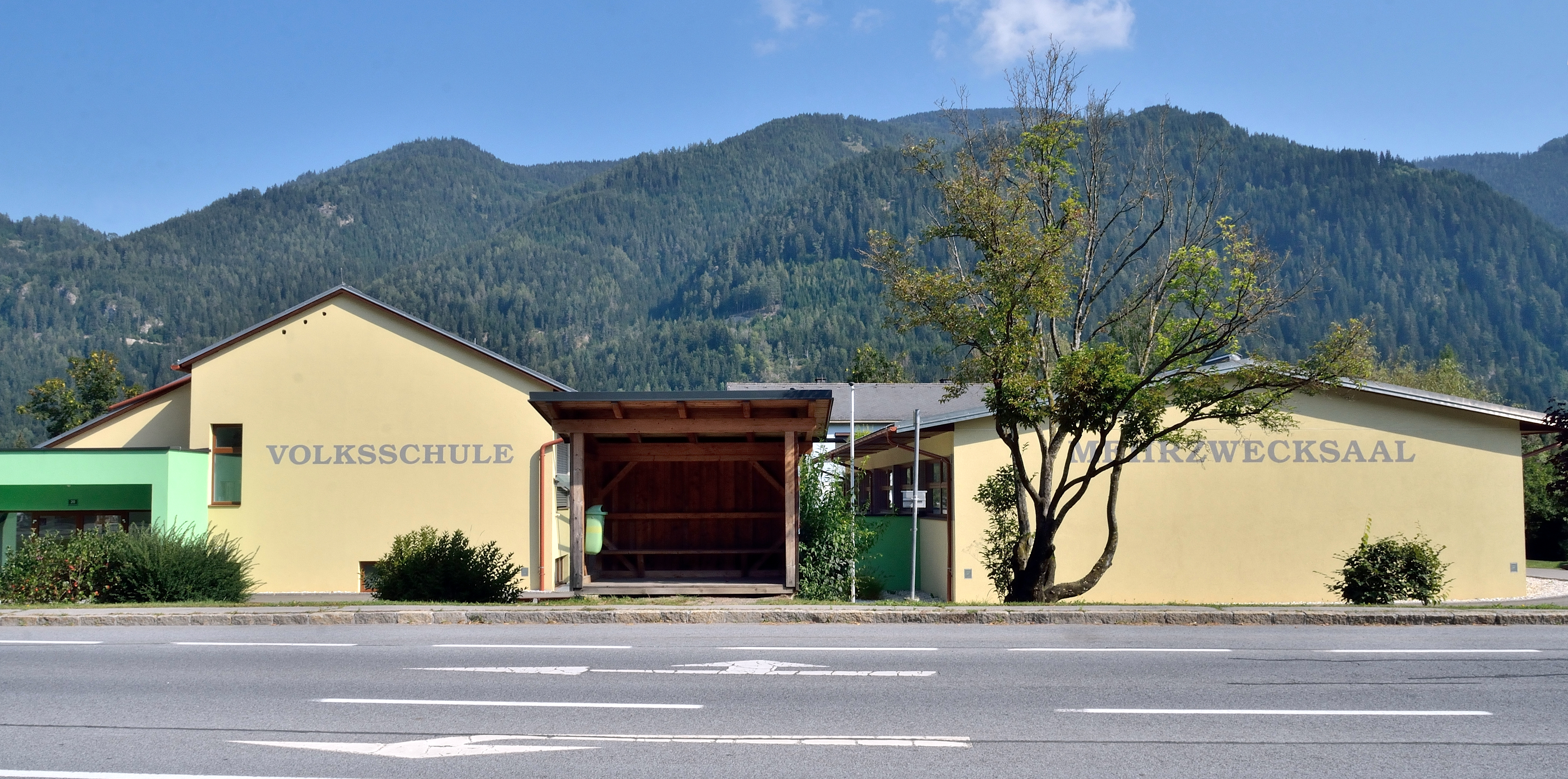 Volksschule und Mehrzwecksaal Frojach an der Murtal Straße in Teufenbach-Katsch, Steiermark.